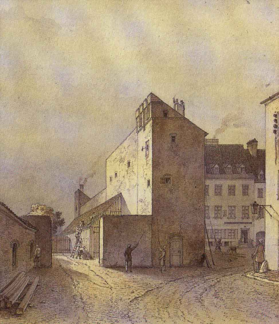 Ansicht des Stadtmauerthurmes u: Anbau von dem Viktualien Markt gegen den Sebastians Platz gegangen genomen. Dieser Theil der alten Stadtmauer kam zum Abbruch am 26t. April 1848. u. mit dem Beginn desselben n. d. Natur gez. v. C. A. Lebschee